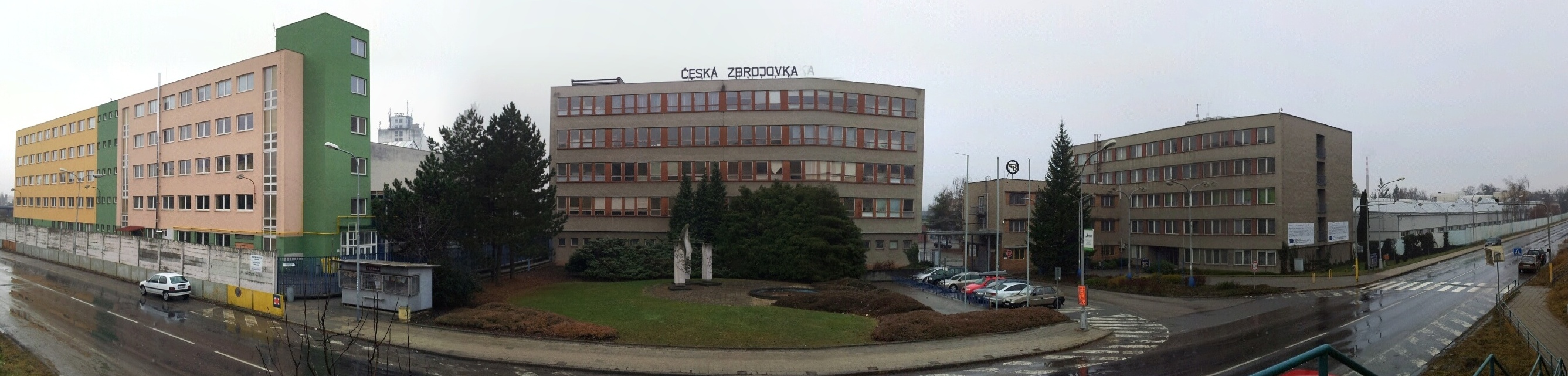 Panorama České zbrojovky v Uherském Brodě